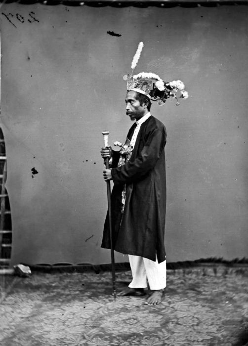 Negatief. Eerste minister van Buton, Zuid-Celebes